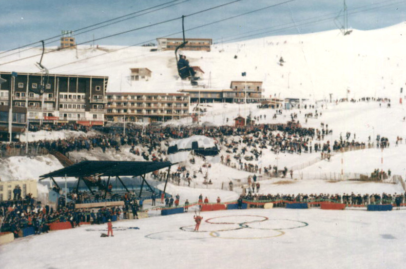 Parachutistes venus se poser dans les anneaux olympiques, devant les tribunes à Chamrousse, lors des Jeux Olympiques de 1968